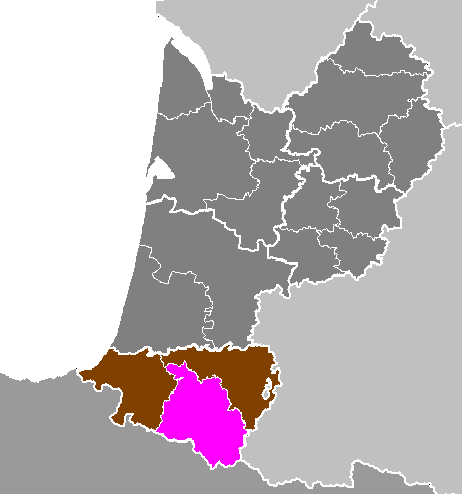 Maps of arrondissements and cantons of France: Département des Pyrénées-Atlantiques - Arrondissement d Oloron-Sainte-Marie.PNG (Région Aquitaine)